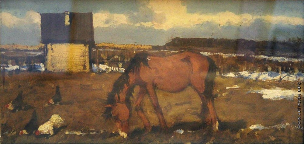 Весенний вечер Год создания 1910-е Материал Картон, масло Собрание Национальный художественный музей Республики Беларусь